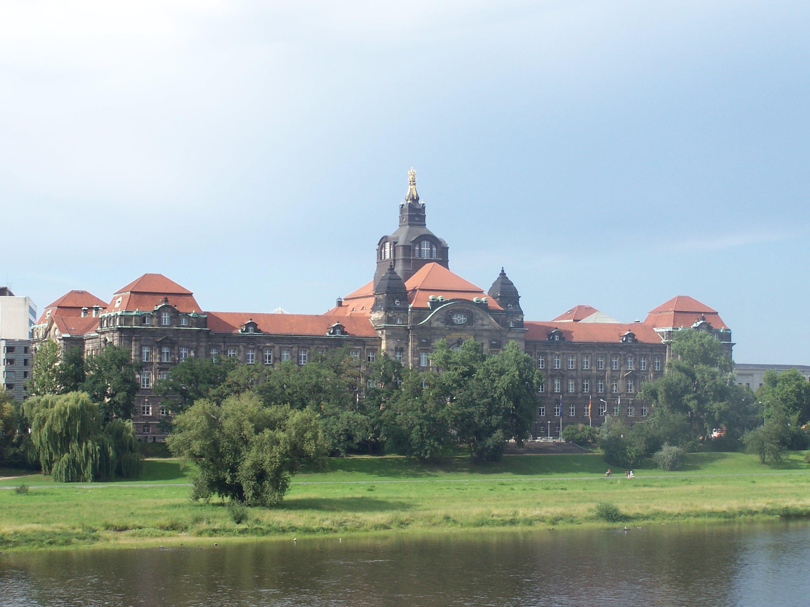 Gesamtministerium in Dresden, heute Sitz der Sächsischen Staatskanzlei, des Justizministeriums und des Innenministeriums